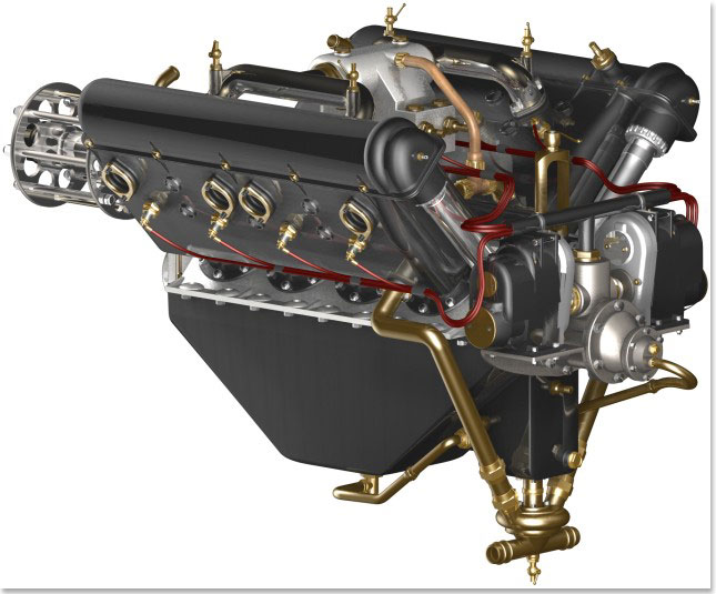 Hispano-Suzia 8BE Motor 220 PS, 8 Zylinder V-Stellung, Wassergekühlt mit Propellergetriebe. Orginalfoto wurde um die Darstellung zu verbessern mit Photoshop Software nachbearbeitet.